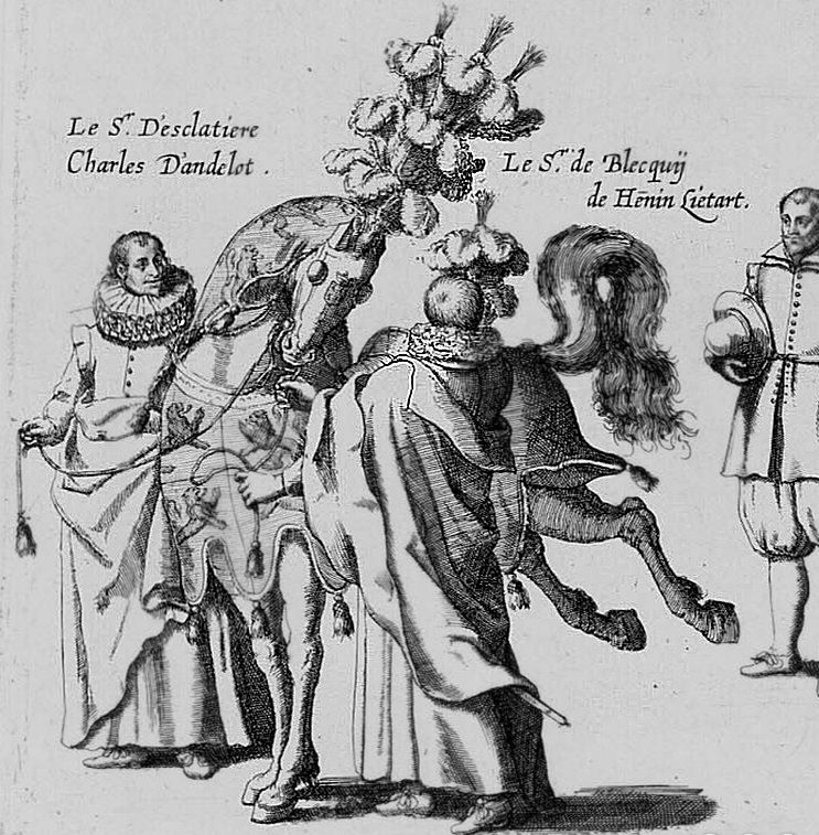 Pompes funèbres de l'archiduc Albert d'Autriche à Bruxelles / Série de 65 gravures d'un recueil relatant les funérailles d'Albert d'Autriche à Bruxelles le 11 mars 1622.